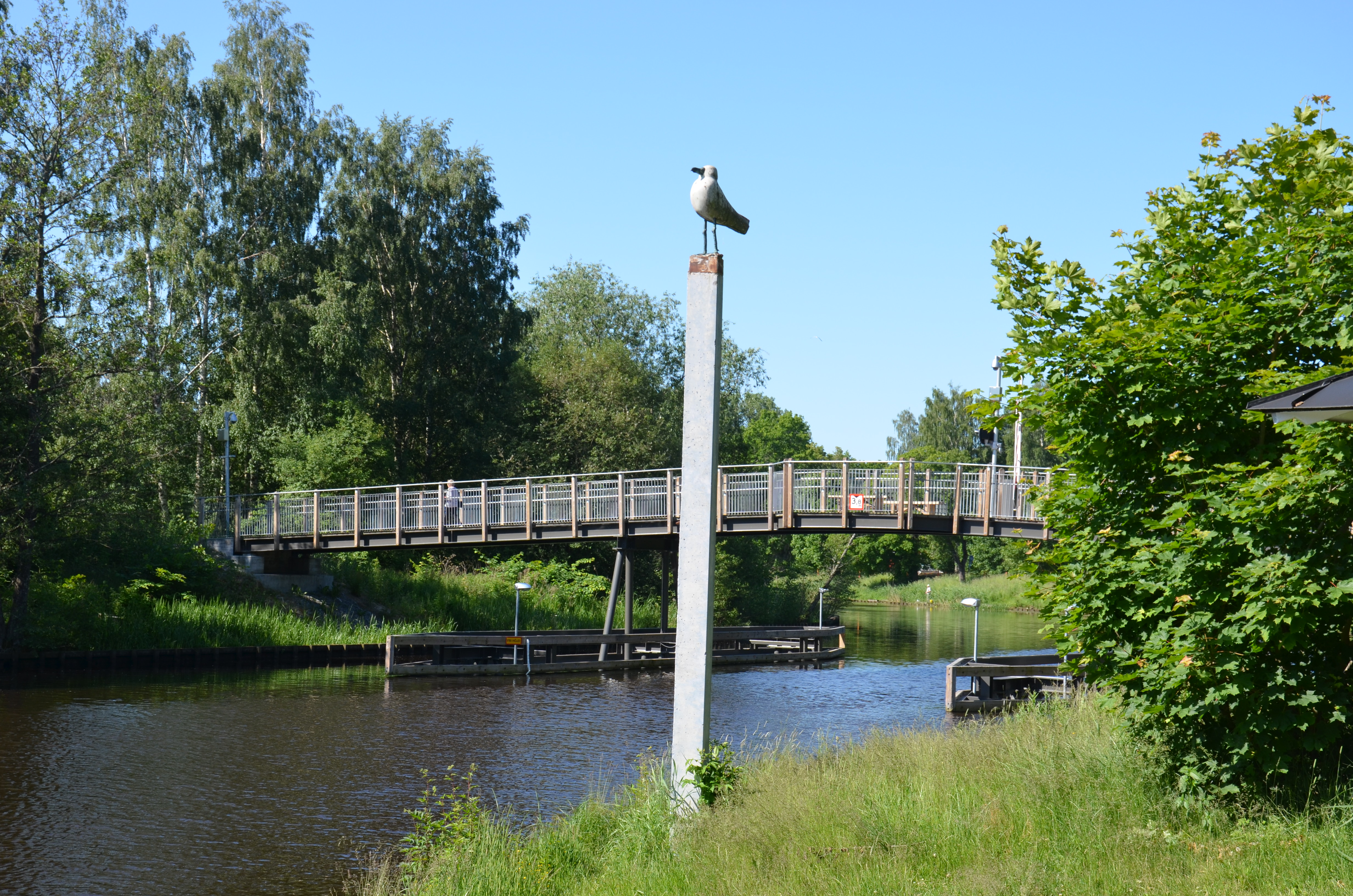 Torsten Molanders Fågeltecken, 1999, framför gångbron mellan Osetss och Rynningevikens naturreervat i Örebro